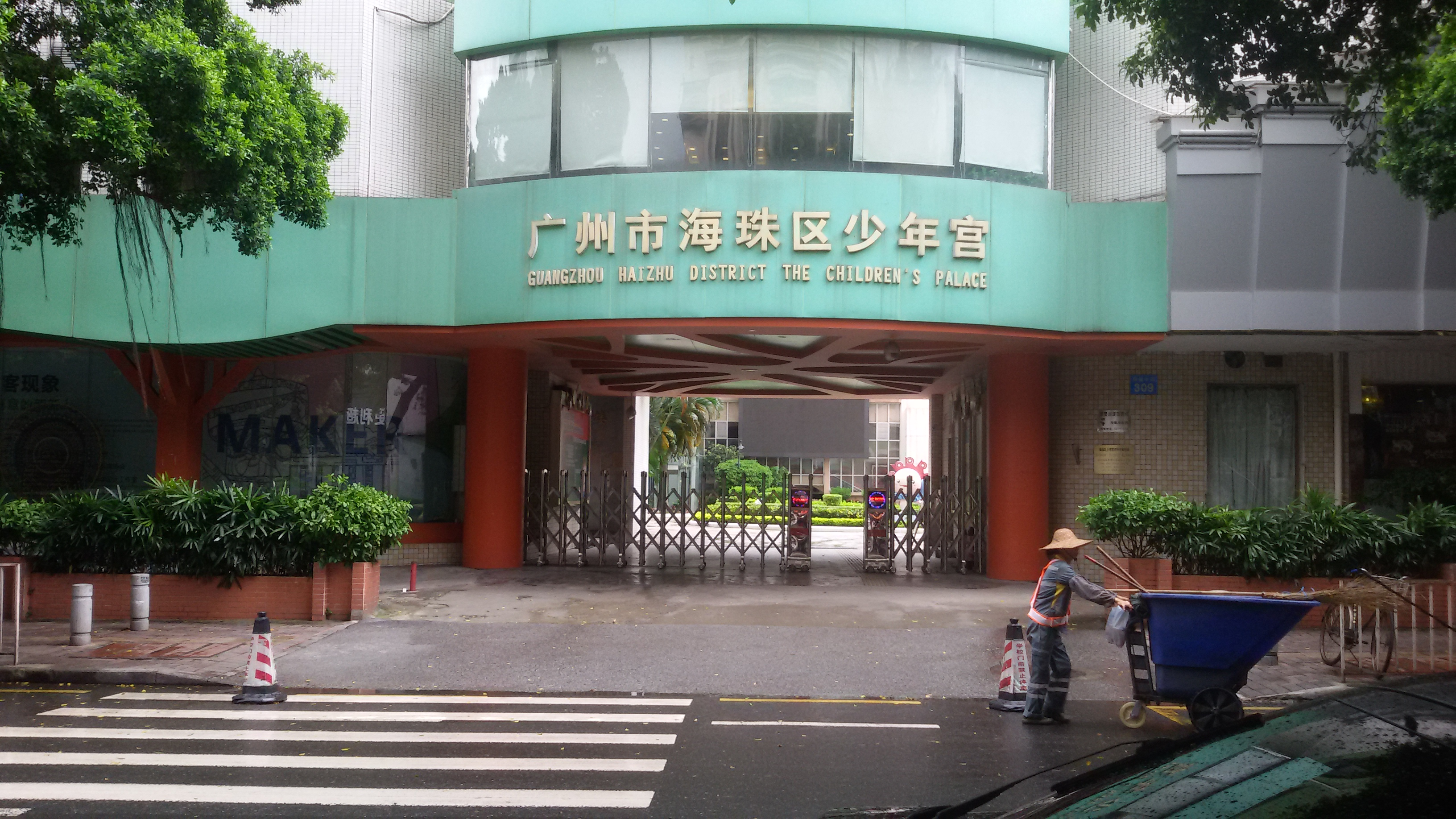 粵語: 海珠区少年宫